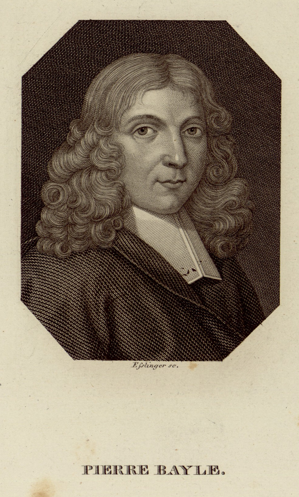 Pierre Bayle